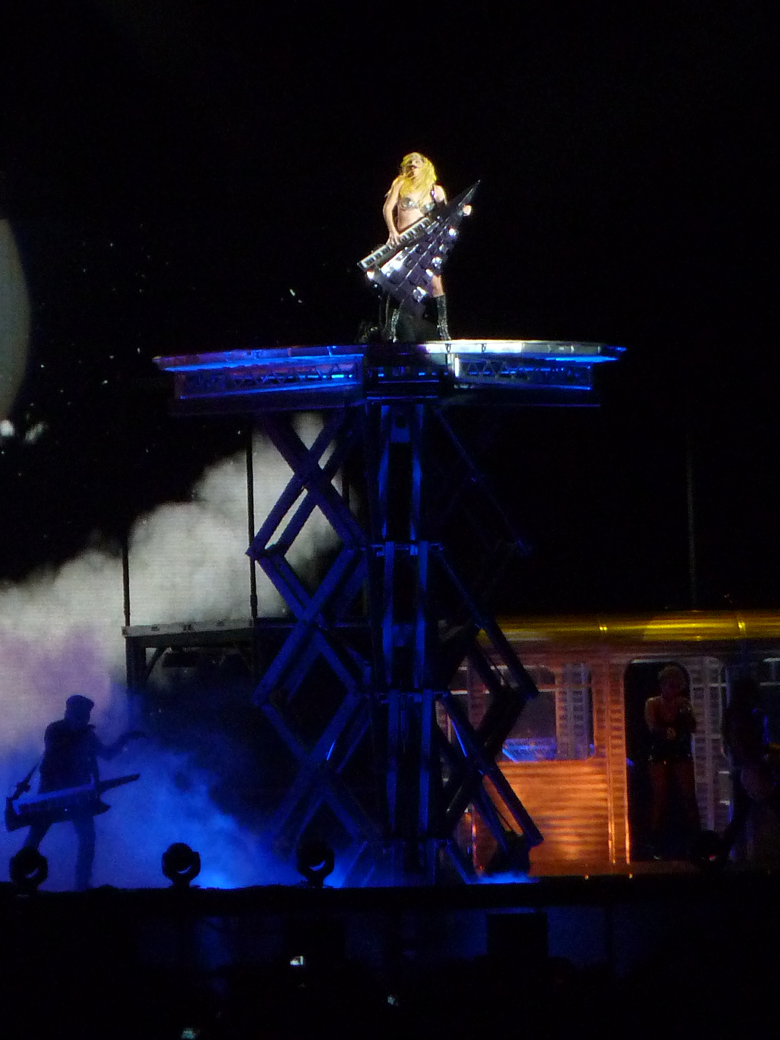 Gaga and keytar